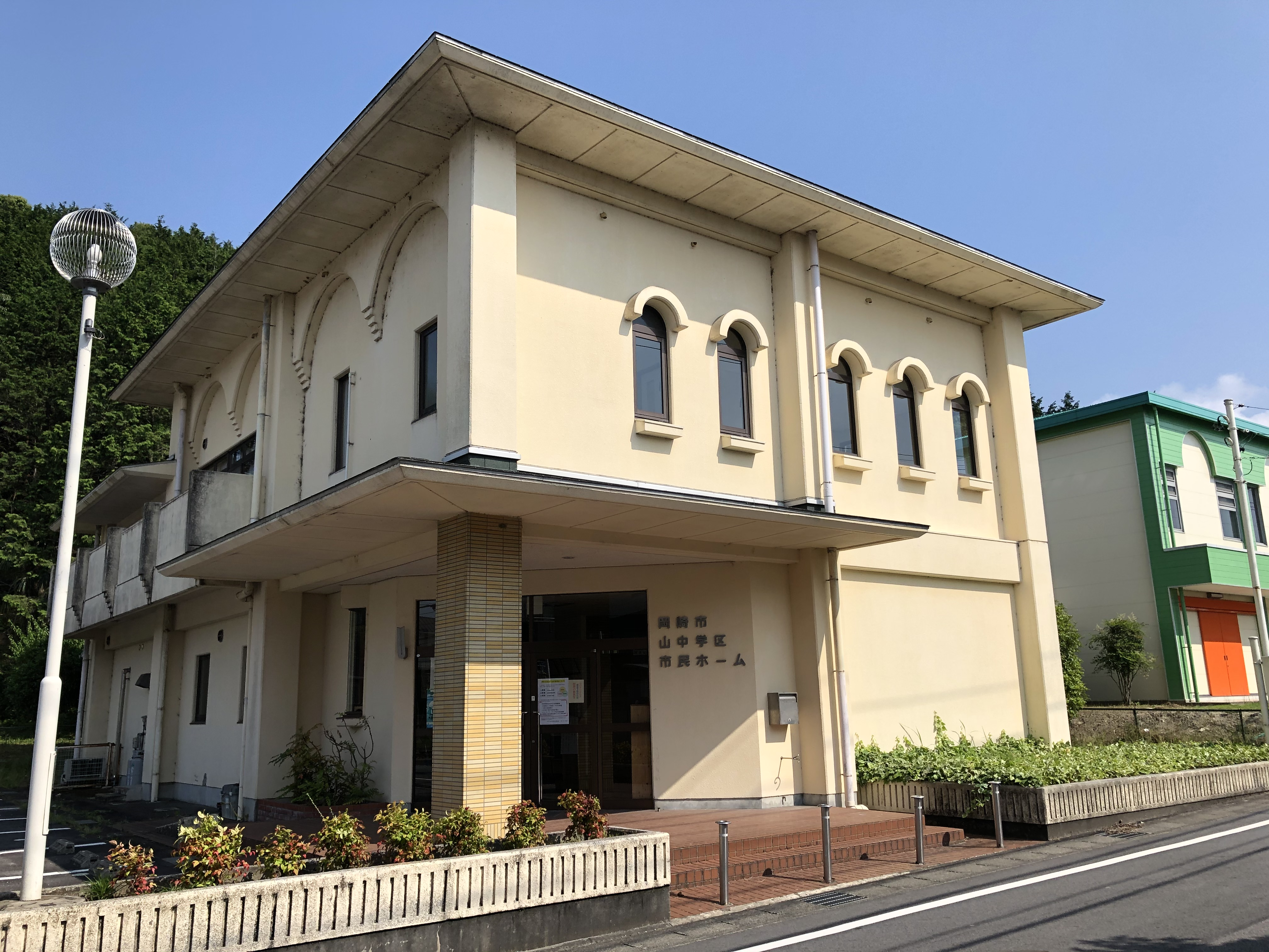 山中学区市民ホーム（岡崎市山綱町）